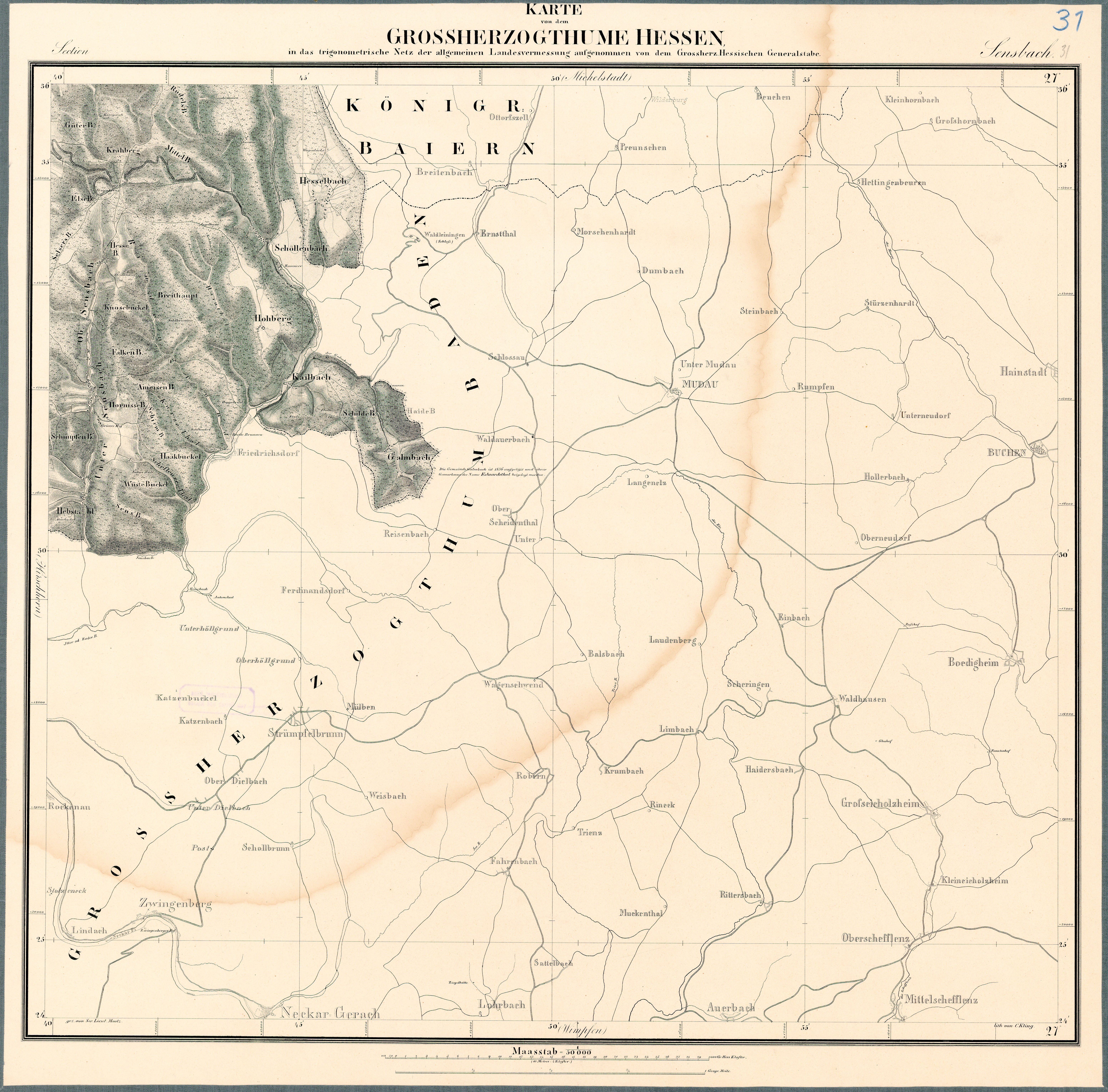 Historische Karte des Großherzogtums Hessen von 1832 bis 1850. Im Maßstab 1:50.000. Blatt 31: Sensbach. Mit Hesselbach, Kailbach u.a. Orten